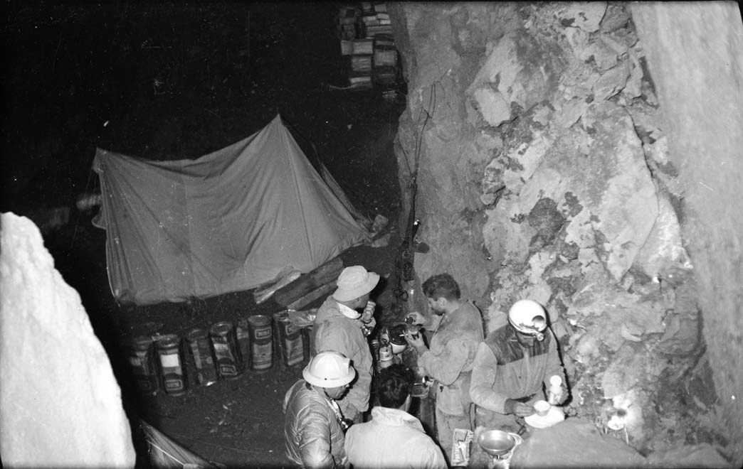 Lepineux Gelako 1º kanpalekua. 1960ko V Euskal Espeleologia Jardunaldiak / EDF Espedizioa. Ezkerretik eskuinera: Georges Lepineux, Jose Bidegain, X, Adolfo Eraso, Isaac Santesteban.